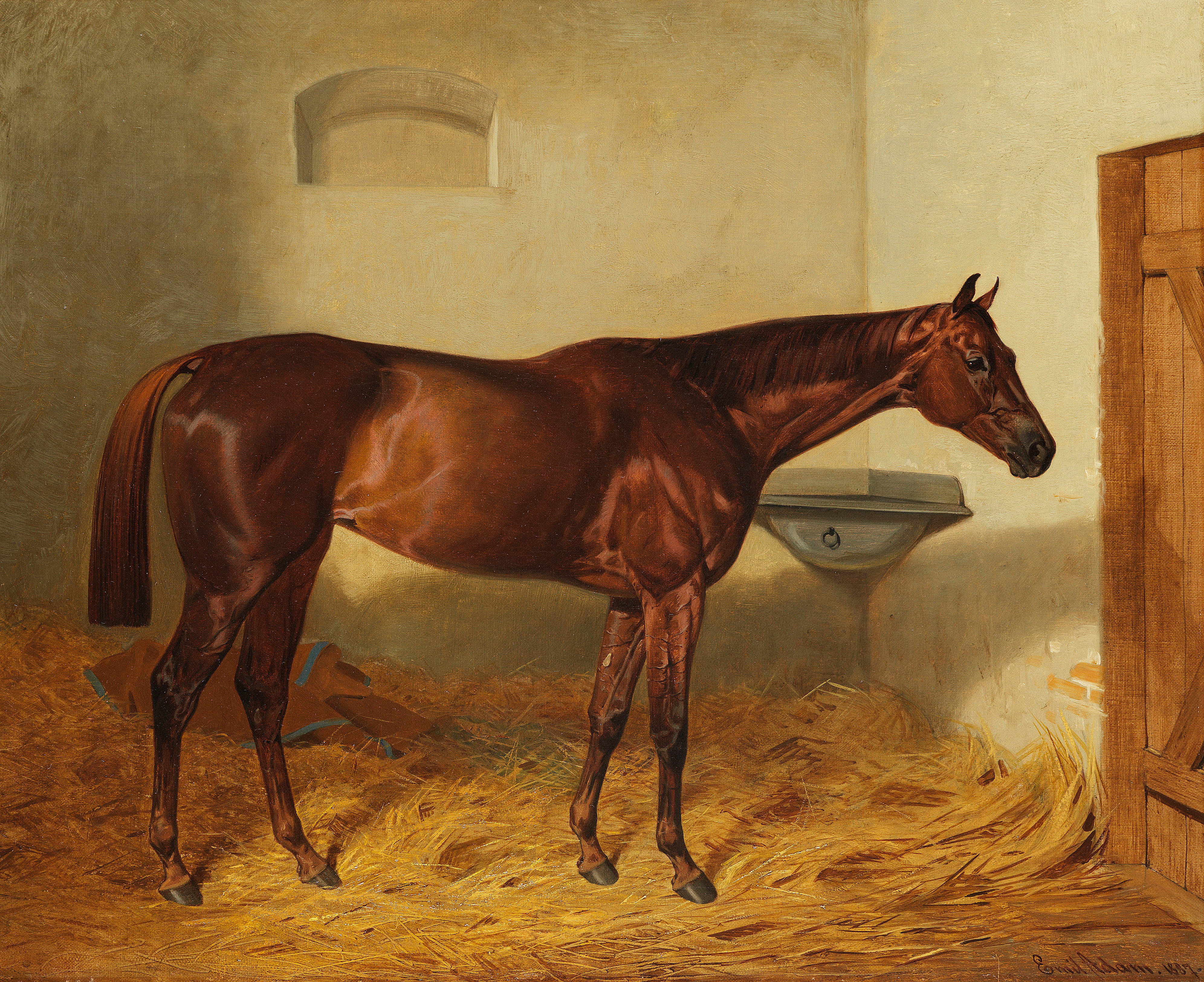 Emil Adam: Die Stute Kincsem